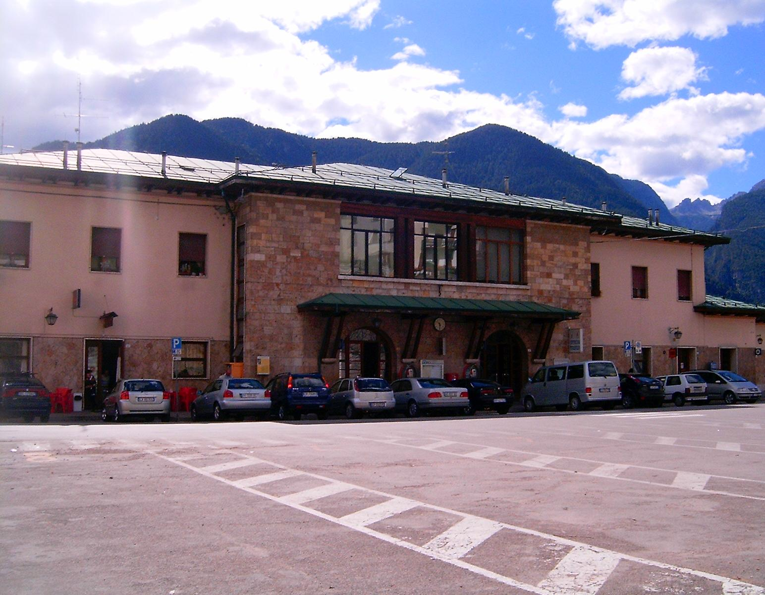 Stazione ferroviaria di Calalzo. La facciata d'ingresso della stazione di Calalzo – Pieve di Cadore – Cortina. Lumbaart: Stasiù dei treni.